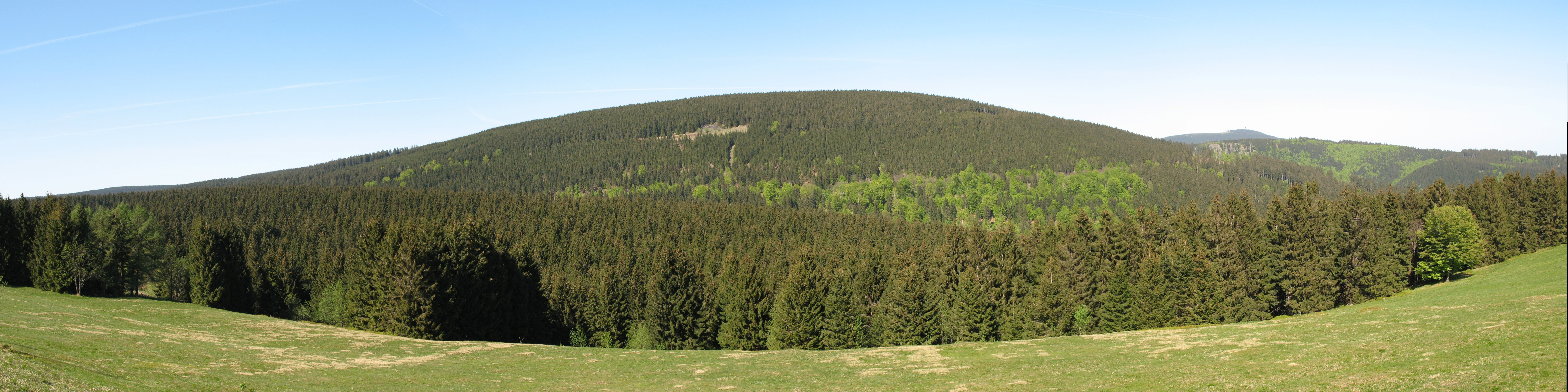 Rehberg-Südseite von der Jordanshöhe nördlich von Sankt Andreasberg aufgenommen. Rechts im Hintergrund die Hahnenkleeklippen und der Wurmberg.